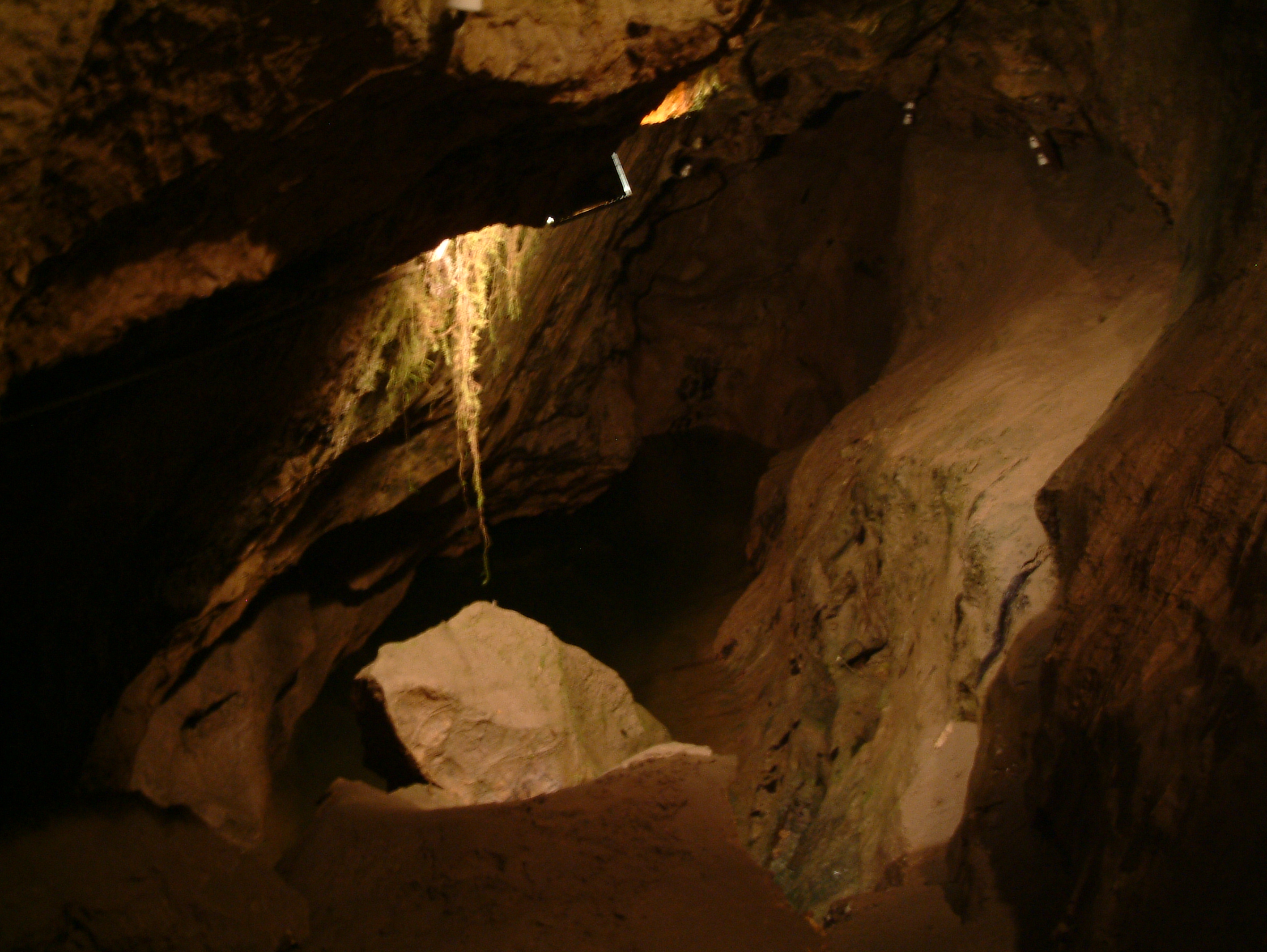 Ende der Sturmannshöhle